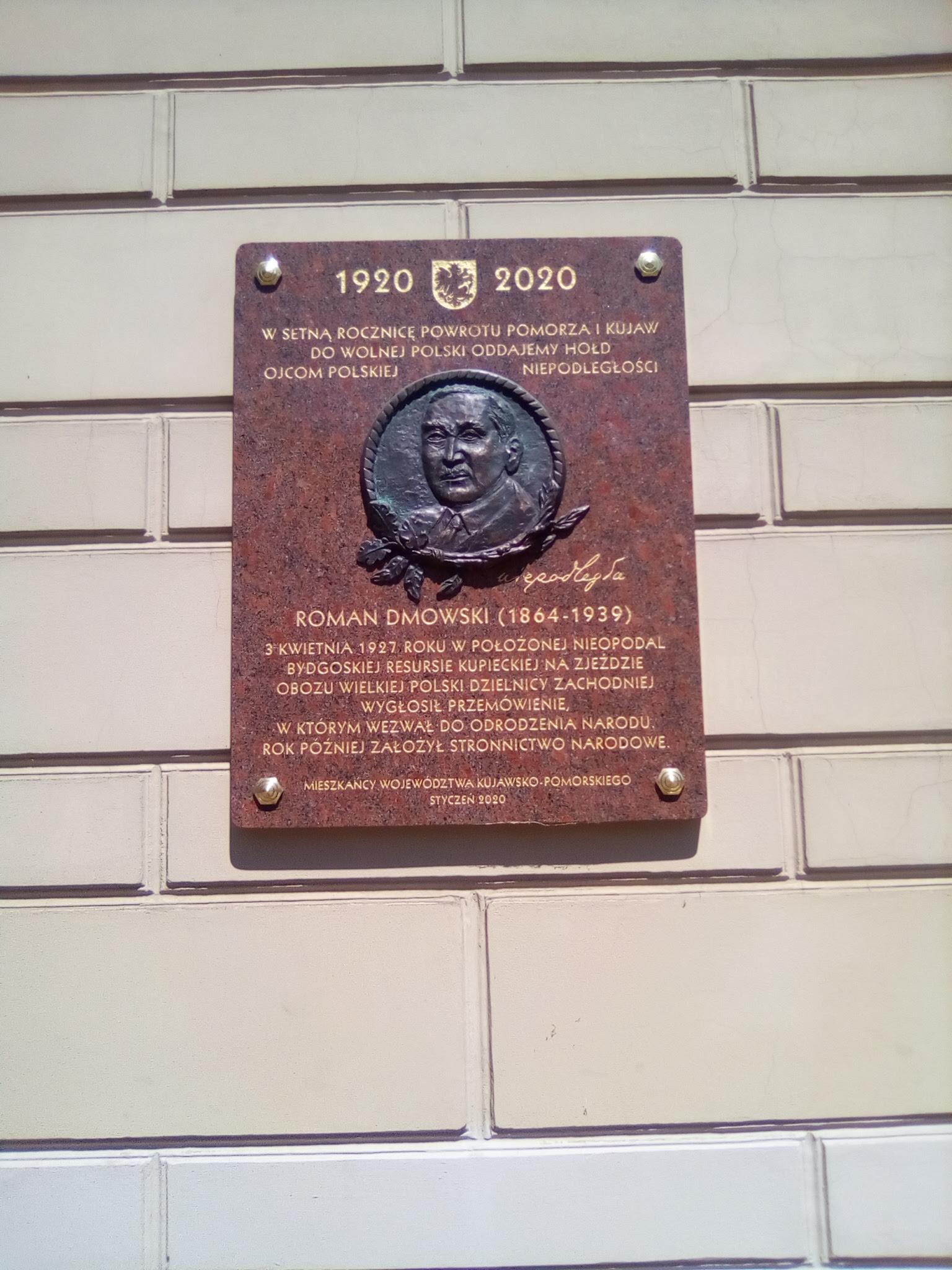 Пам'ятна таблиця Романа Дмовського в Бидгощі